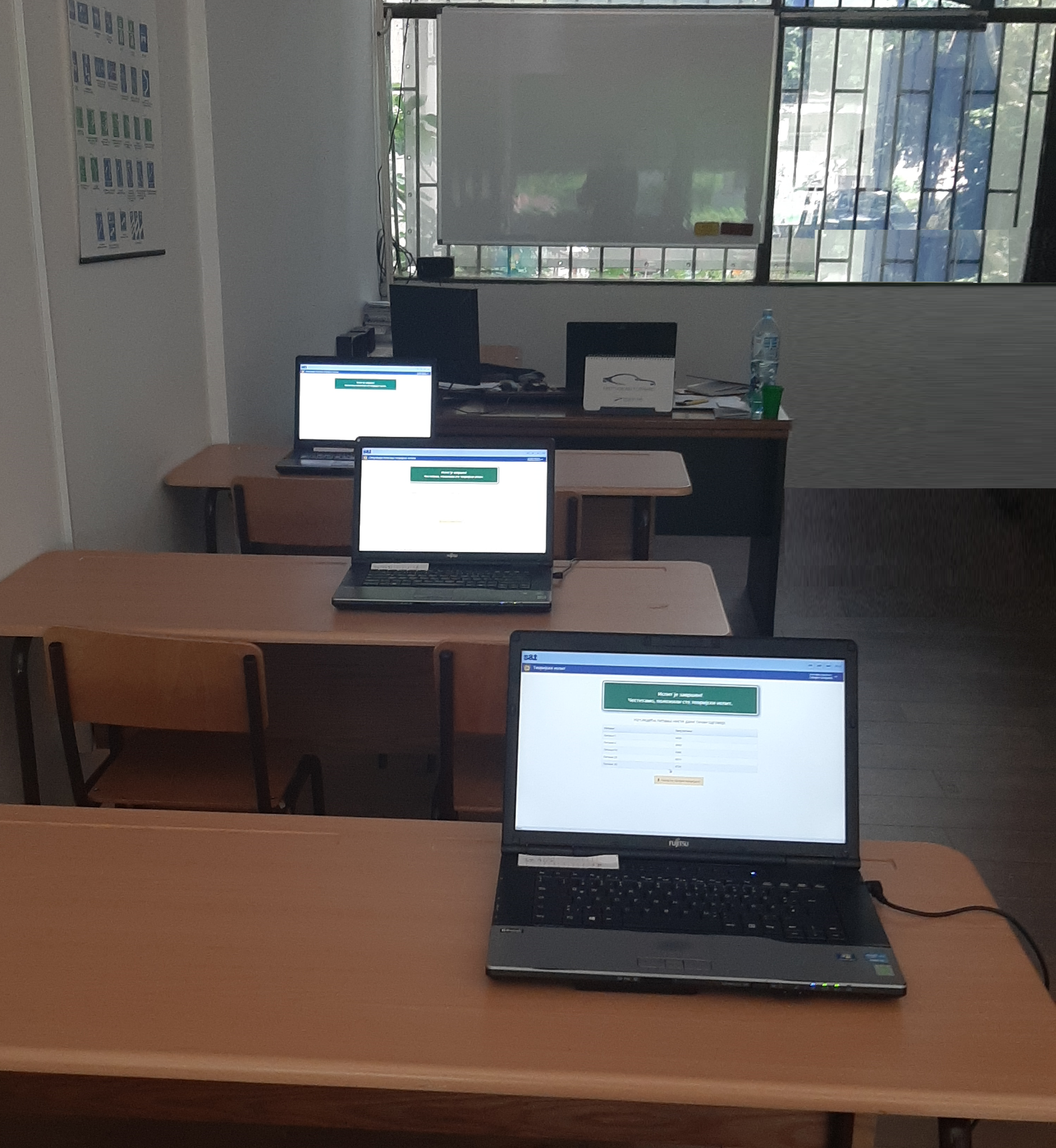 Polaganje teorijskog ispita